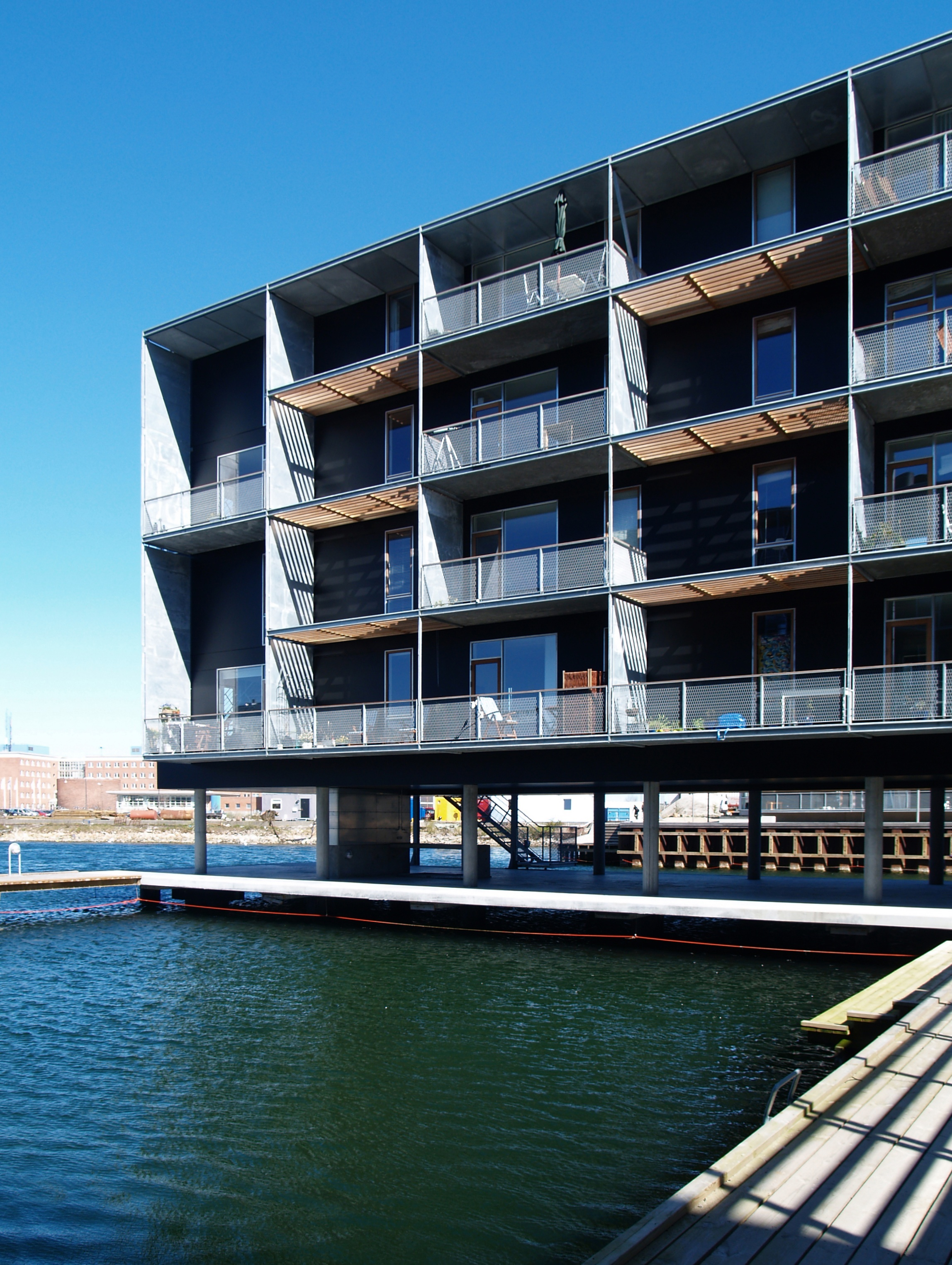 Teglværkshavnen harbour housing, Copenhagen, Denmark 2003-2008. Architects: Tegnestuen Vandkunsten.